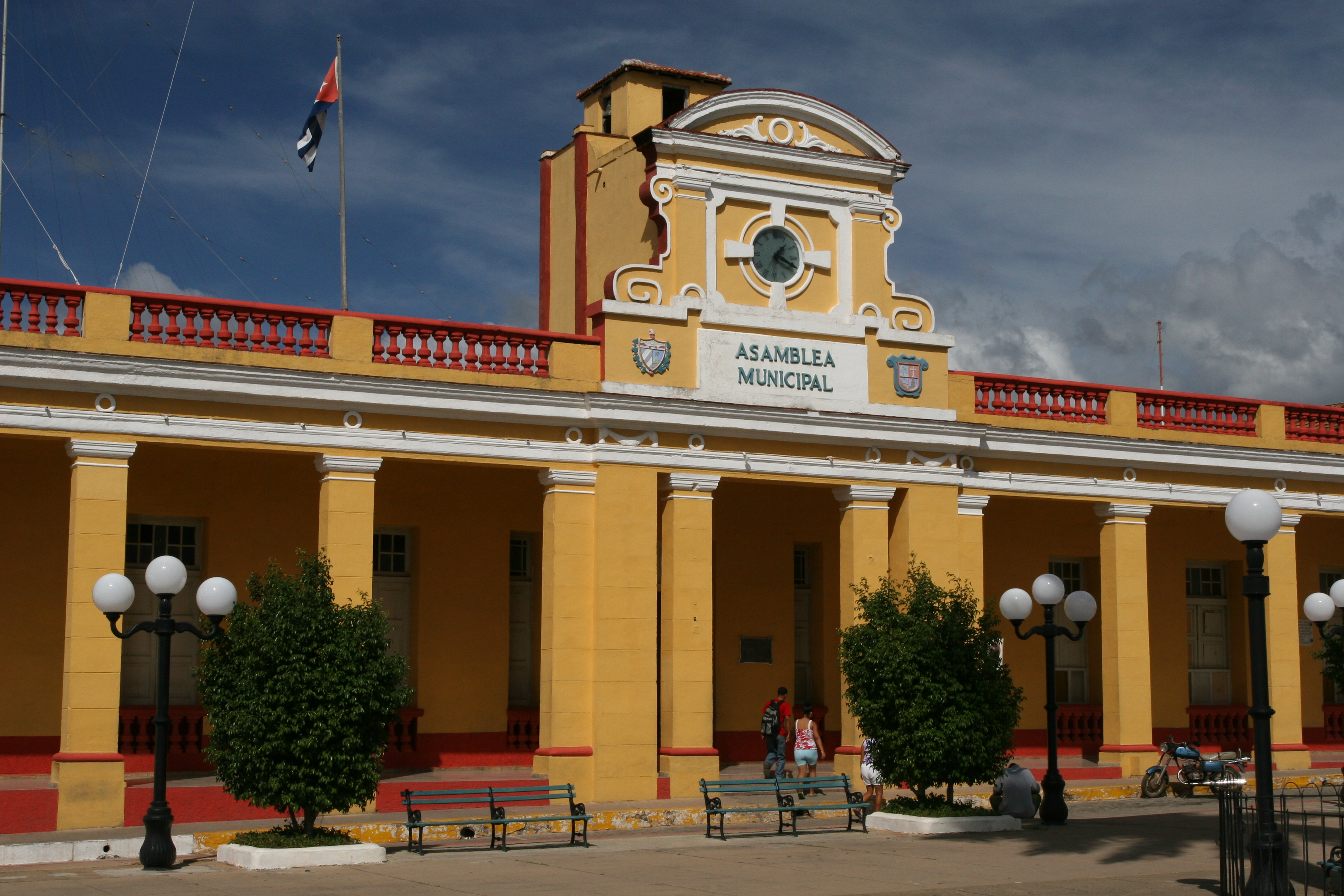 Hôtel de ville de Trinidad sur la place Céspedes, Cuba.